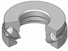 Arraboladun errodamendu axial zilindrikoak